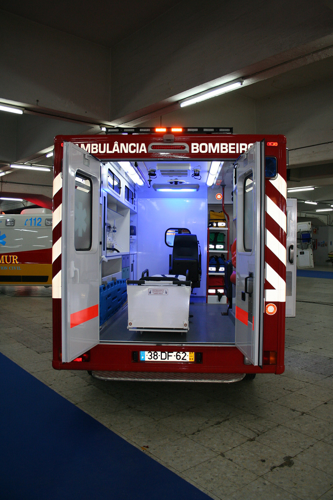 Ambulância dos bombeiros portugueses.